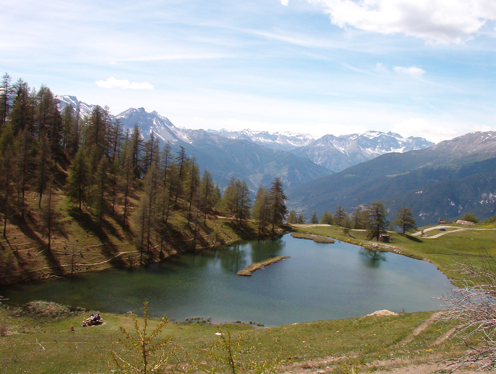 Lago Laune - Valle di Susa - Provincia di Torino - Italia